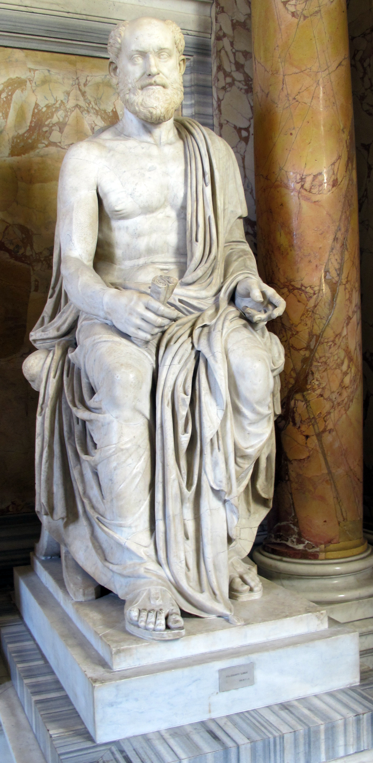 Arte romana nei Musei Vaticani